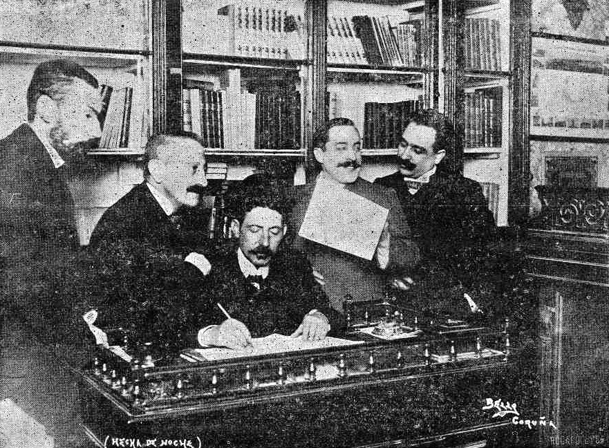 Capa do número 521 da Revista Gallega (10º aniversario) co seu consello de redacción